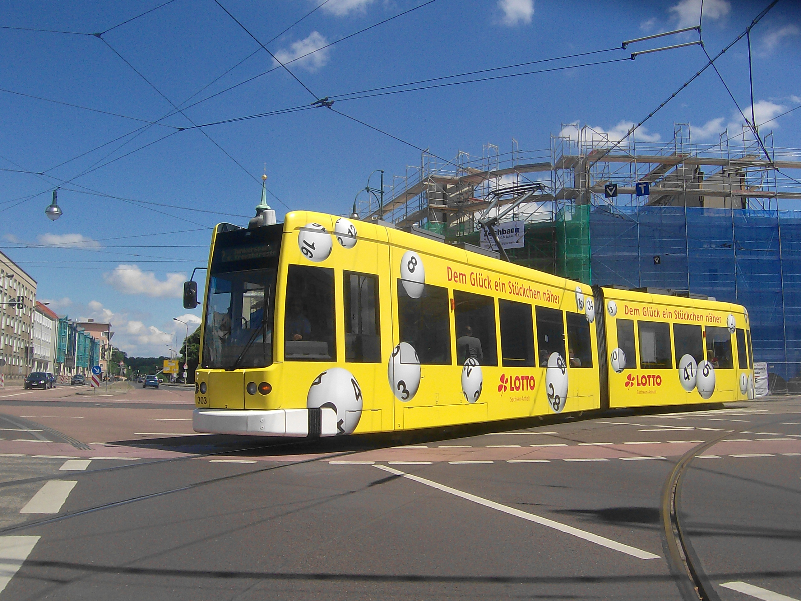 NGT 303 am 05.07.2008 am Museum in Dessau-Roßlau.